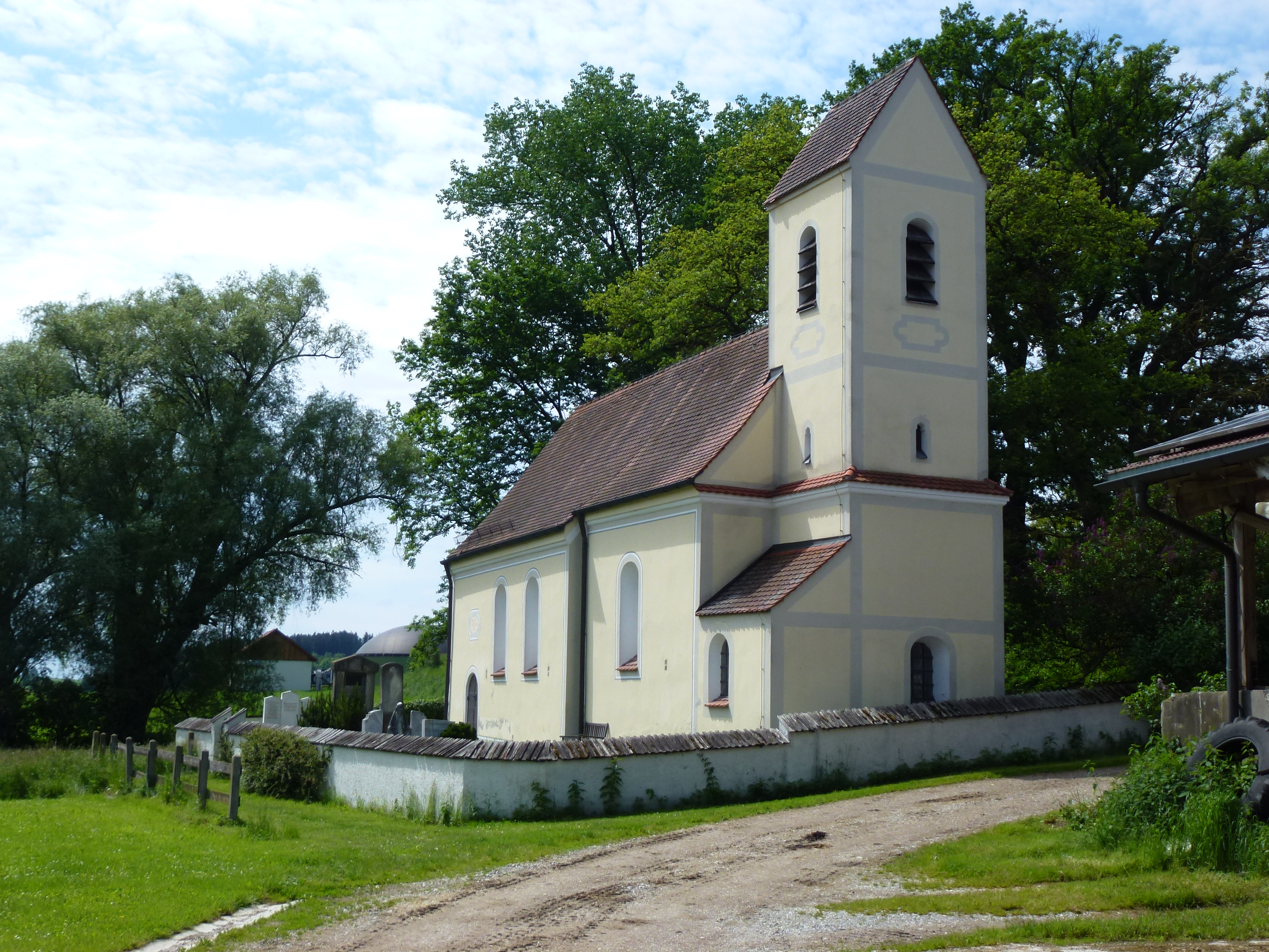 Breitenau, Katholische Filialkirche St. Bartholomäus. Ansicht von OSO